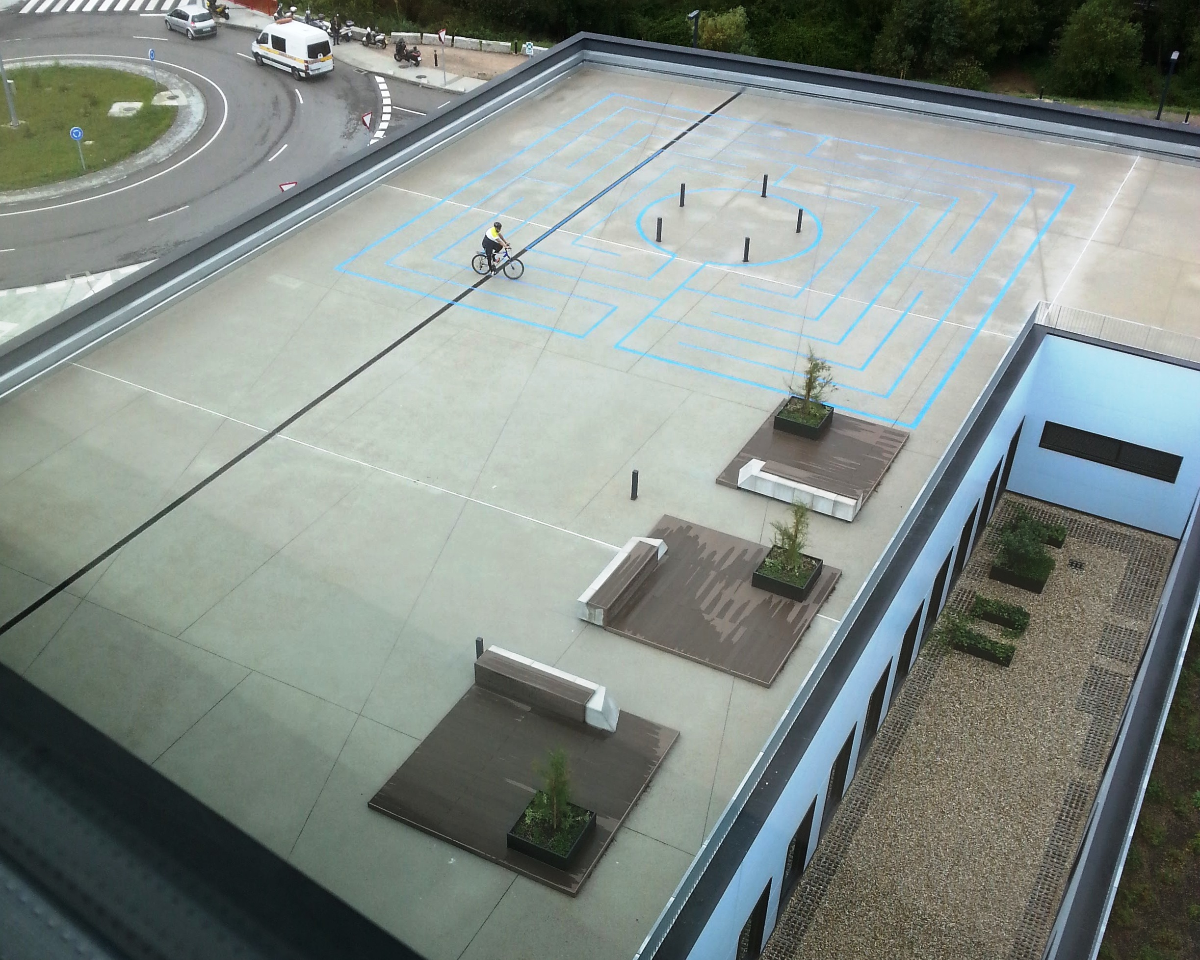 véxase o título e as categorías